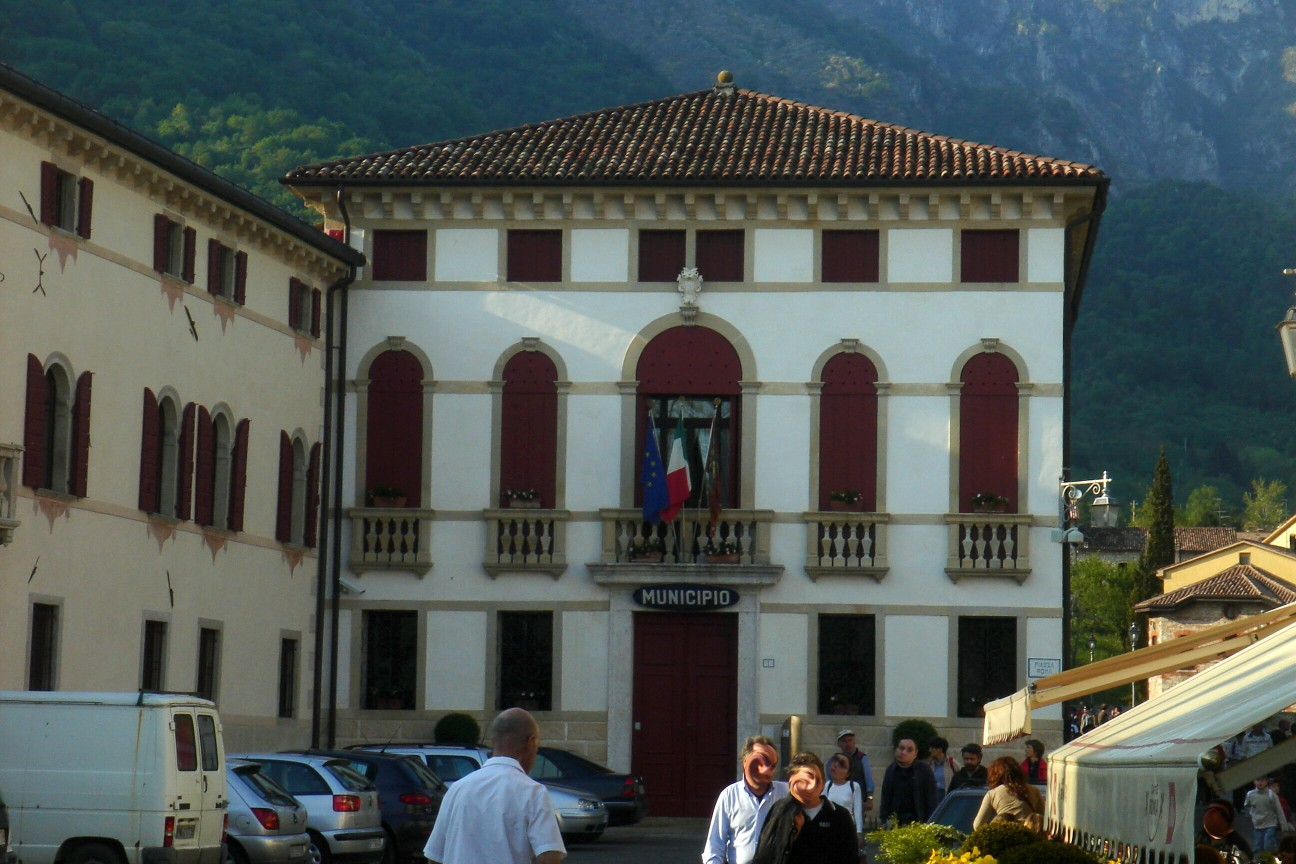 Cison di Valmarino - Municipio